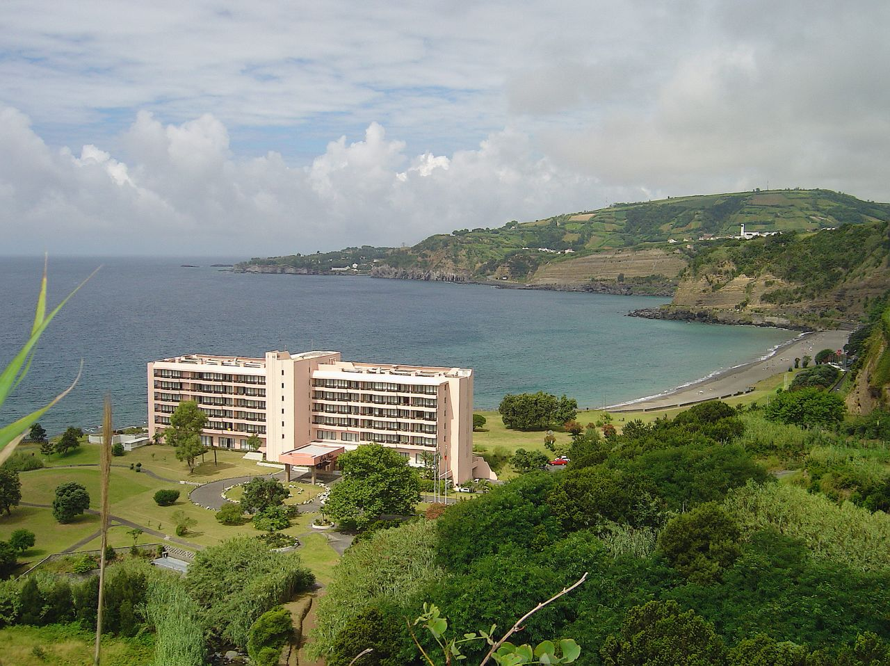 Praia de Água de Alto